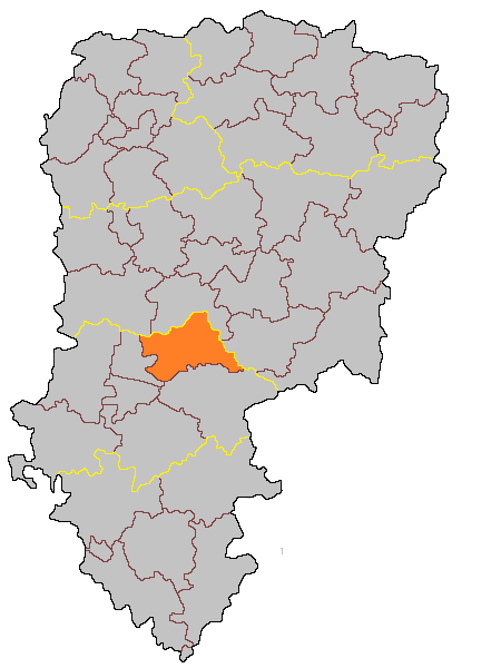 Кантон Вайи-сюр-Эн на карте департамента Эна